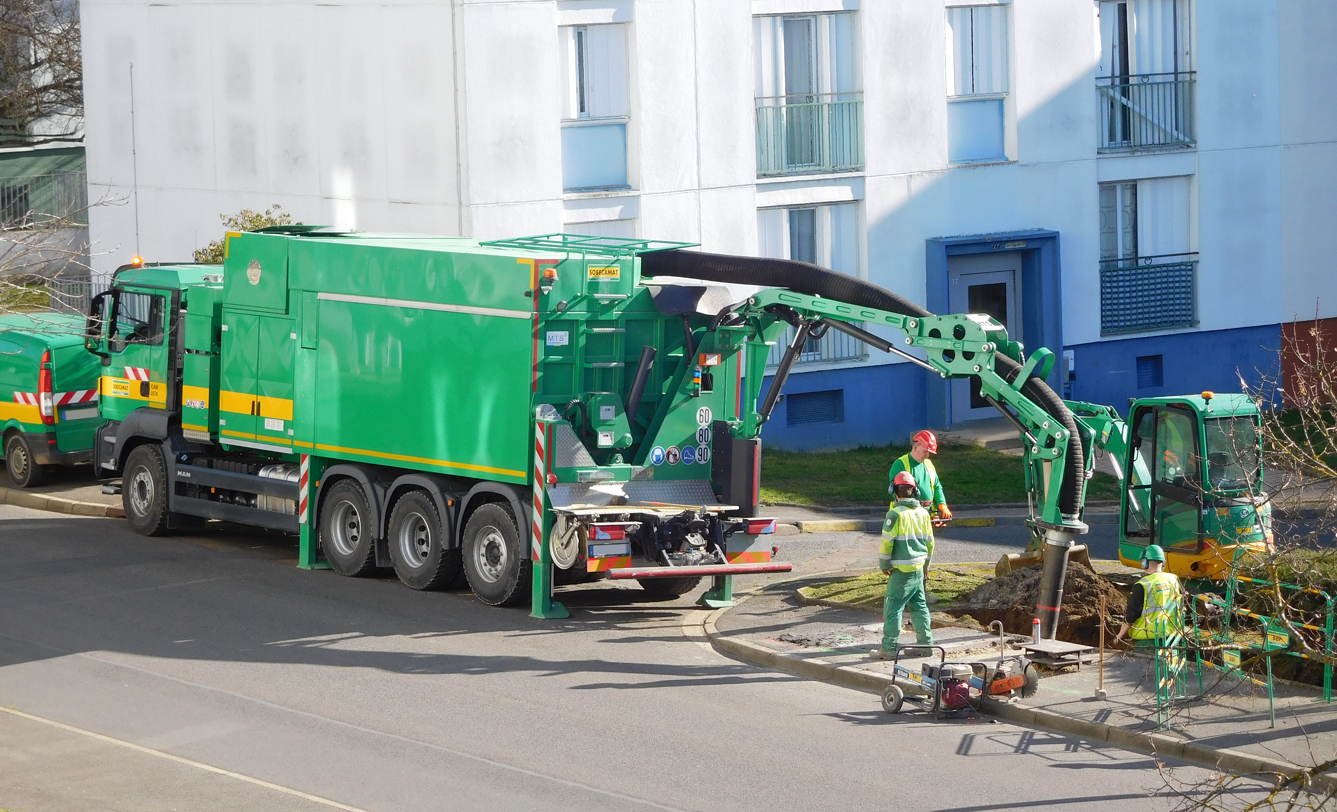 En action, excavatrice-aspiratrice MTS (avec benne) radiocommandée, sur porteur MAN, de l'entreprise Sobecamat (groupe Firalp). Excavatrice aspirant un sol avec câbles et tuyauteries enterrés (notamment fibre pour haut débit).